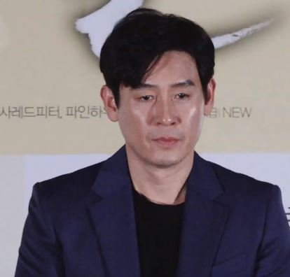 영화 '생일' 제작보고회가 6일 오전 서울 강남구 압구정CGV에서 열렸다